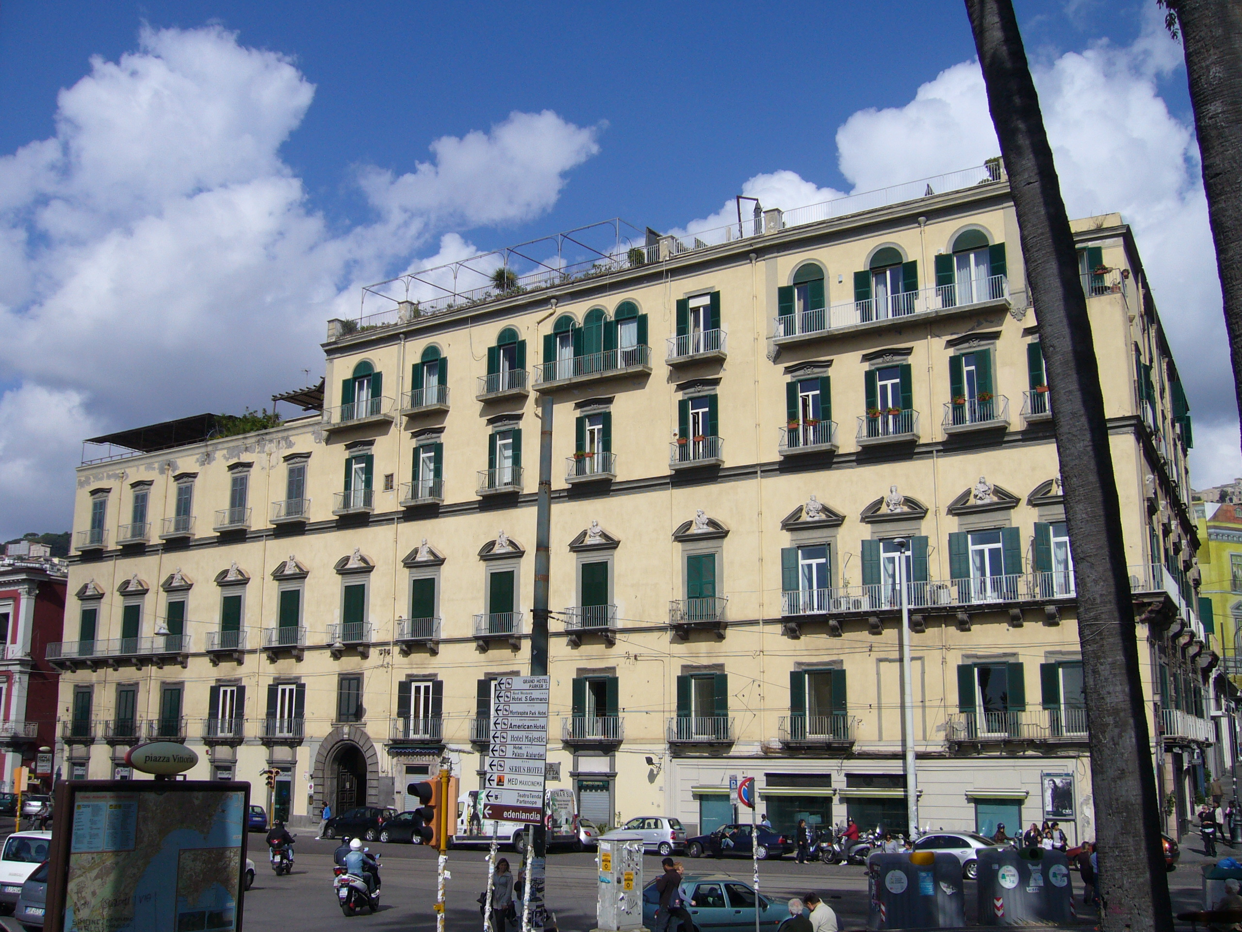 Palazzo Ravaschieri di Satriano a Napoli, dimora del generale e politico italiano Carlo Filangieri (1784-1867)